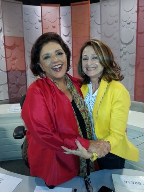 Leda Nagle (Juiz de Fora, 5 de janeiro de 1950) é uma jornalista, escritora, atriz e apresentadora de televisão brasileira.[1] Atualmente dirige o programa semanal Sem Censura, na TV Brasil.Maria José de Castro Polessa, cujo nome artístico é Zezé Polessa, (Rio de Janeiro, 22 de setembro de 1953) é uma médica e atriz brasileira.